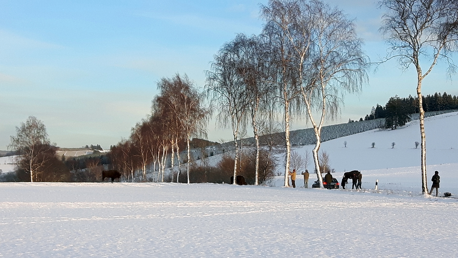 Schmallenberg-Almert, freilebende Wisente